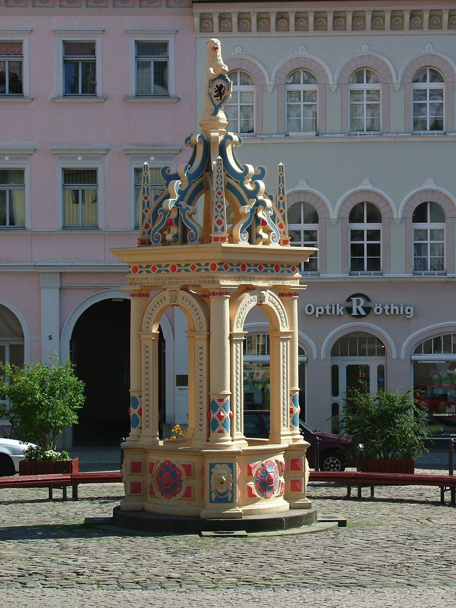 Brunnen von 1589 auf dem Neumarkt in Oschatz/Sachsen (selbst fotografiert)